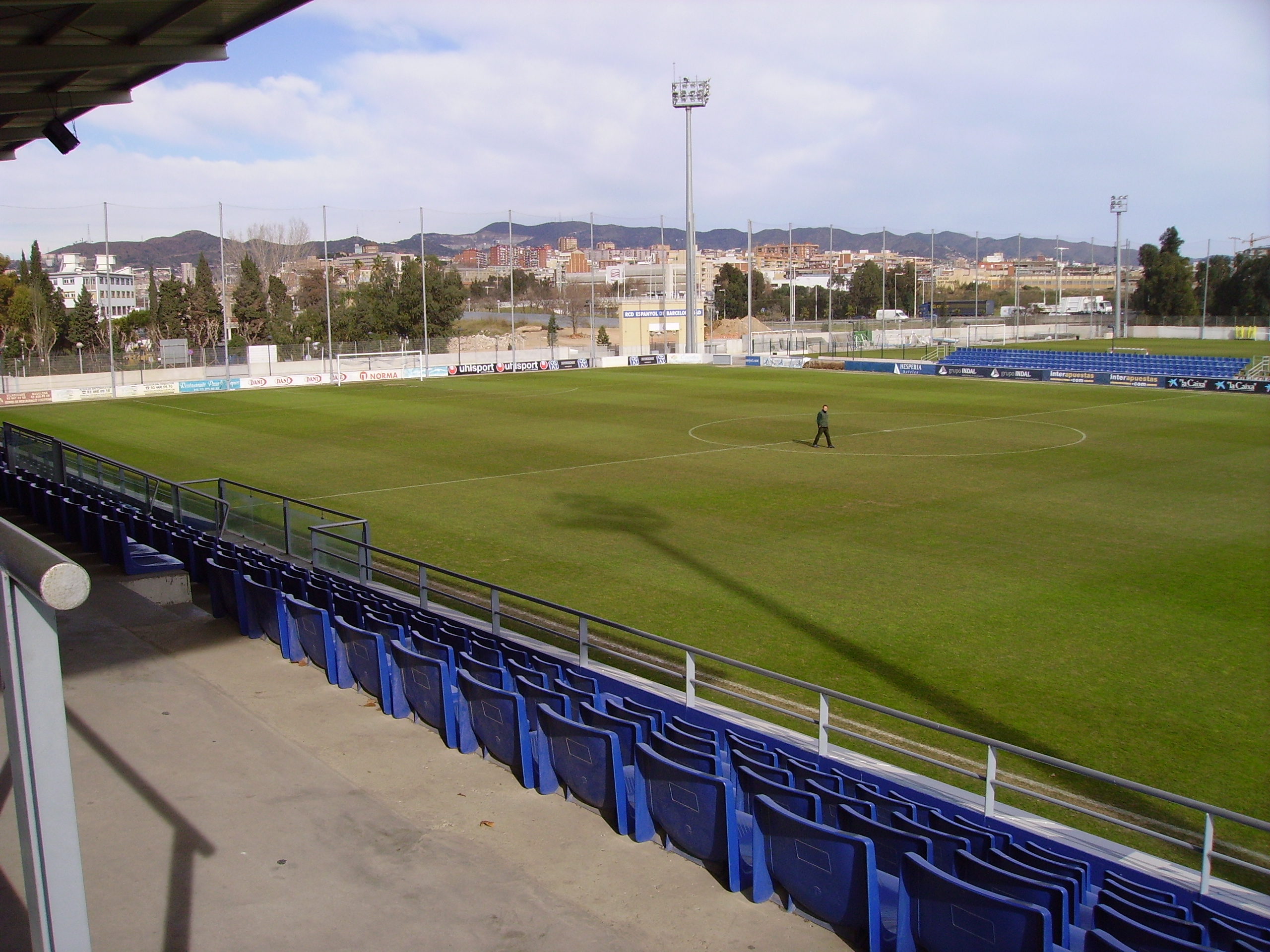 Camp de la Ciutat Esportiva del RCD Espanyol (Sant Adrià de Besòs, Barcelonès, Catalunya).